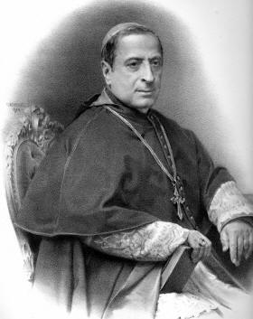 Kardinal Antonine De Luca (1805-1883), Apostolischer Nuntius in München und Wien.